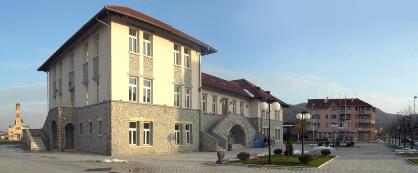 Zgrada Centra za kulturu "Filip Višnjic" u Ugljeviku. (panorama)